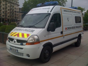 Ce véhicule est un véhicule d’intérêt général prioritaire lorsqu'il est en mission